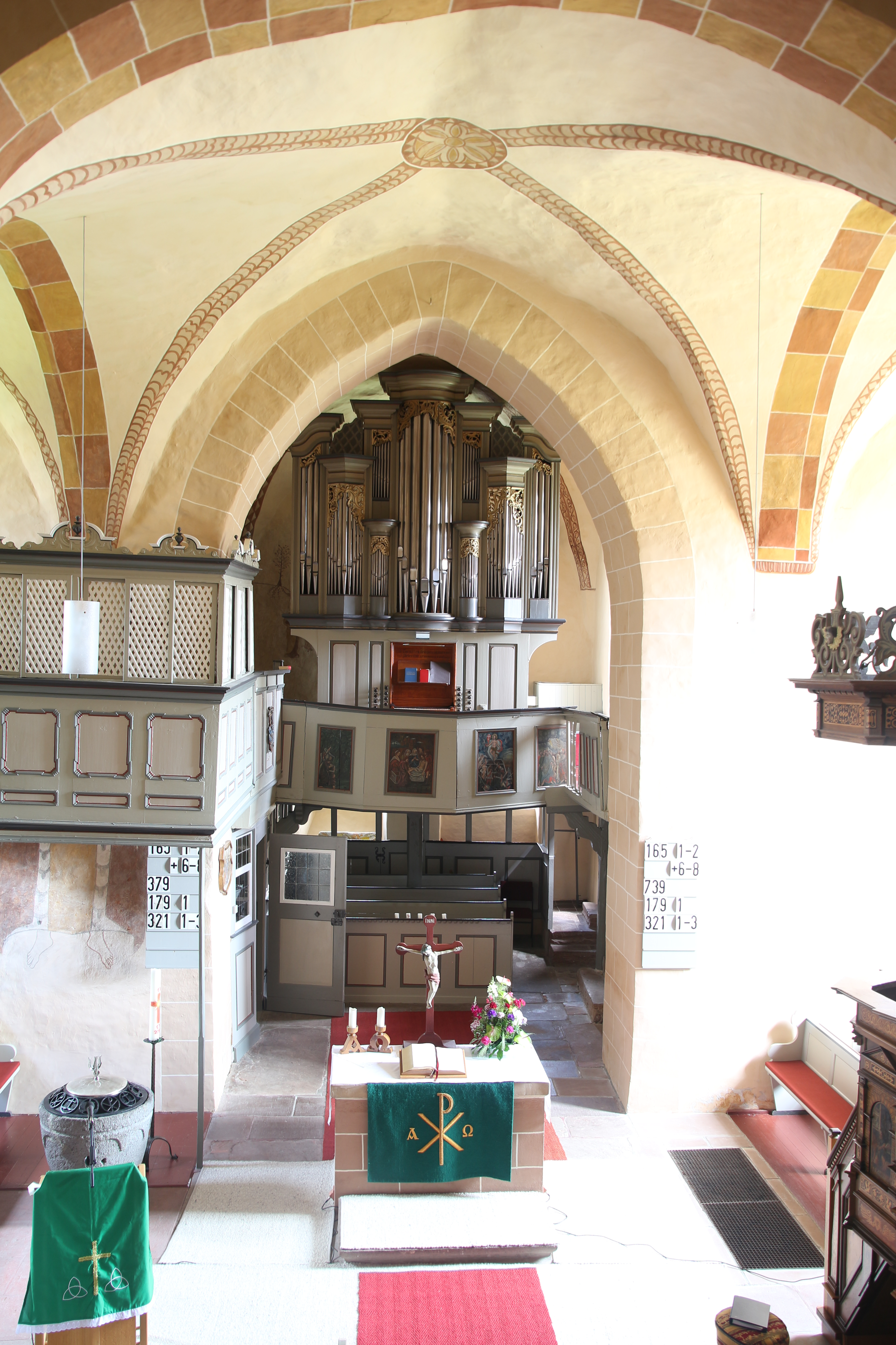 Evangelische Kirche Breidenbach, Landkreis Marburg-Biedenkopf, Hessen